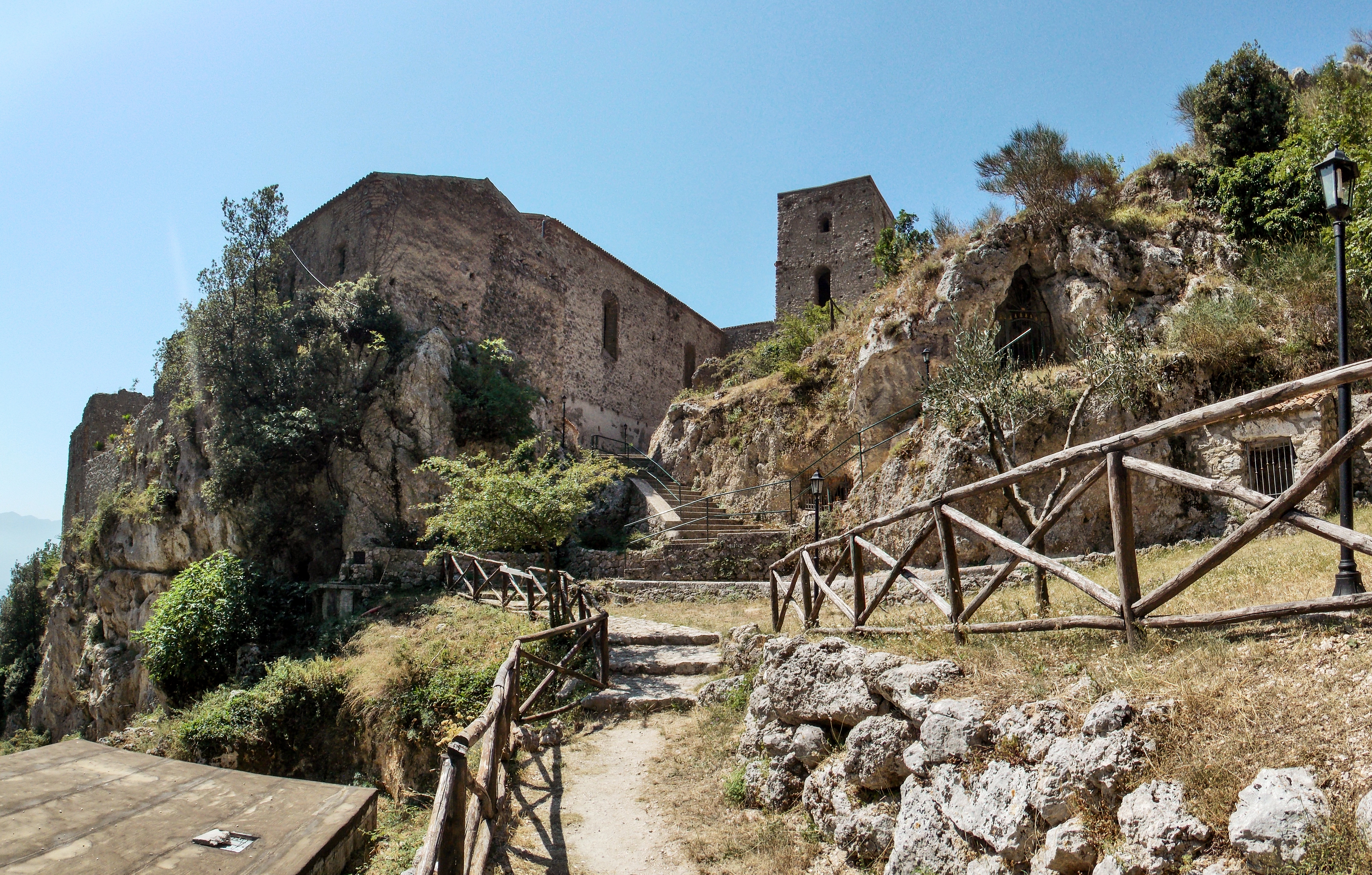 Il santuario della Madonna del Taburno a Bucciano (BN)